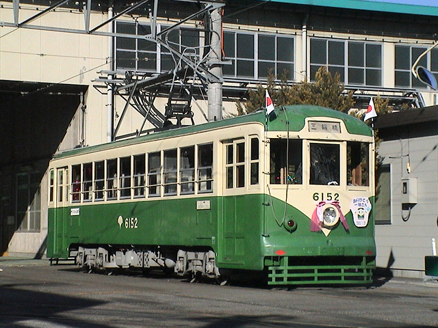 都電6000形電車一球さん号 一球さんさよなら撮影会にて撮影